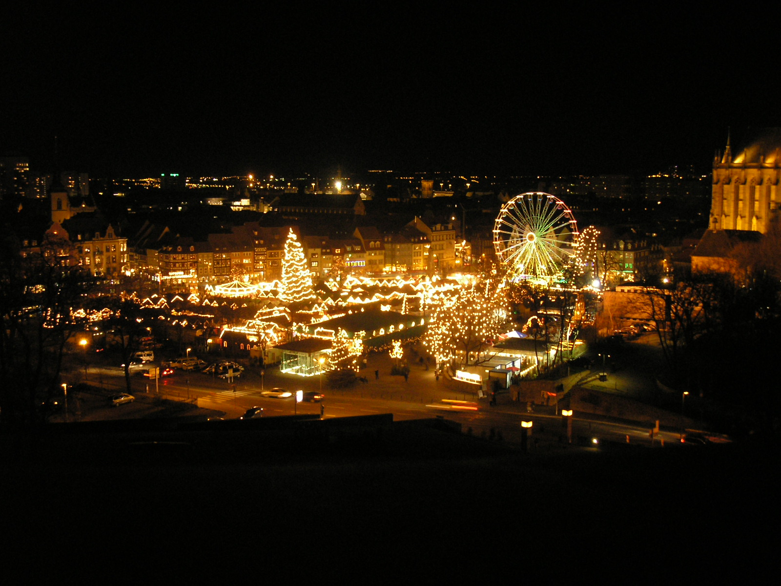 Der Erfurter Weihnachtsmarkt bei Nacht von der Zitadelle Petersberg aus gesehen.